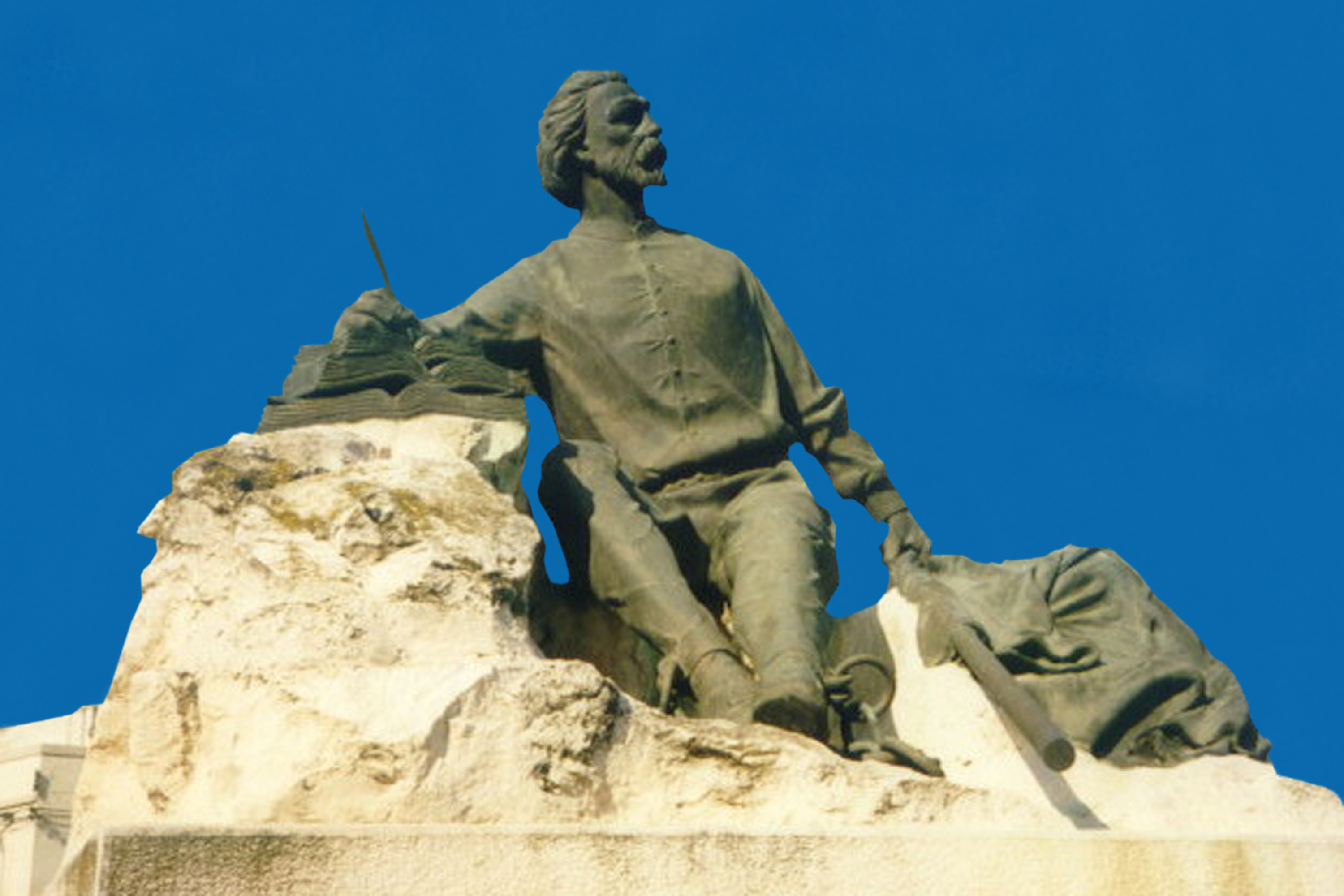 Statue de Vassalli à Zebbug